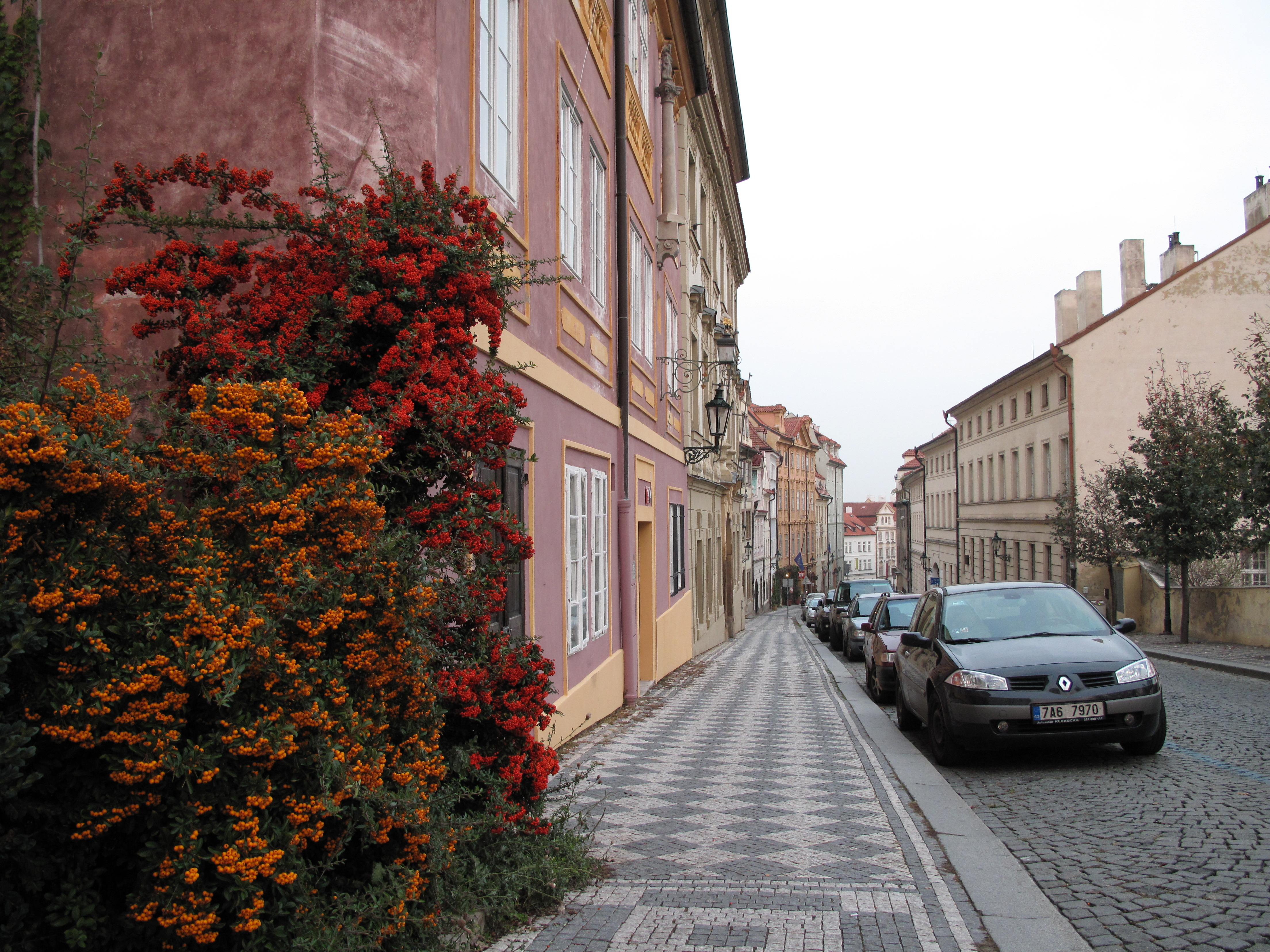 Hradčany, Praha, Česká republika.